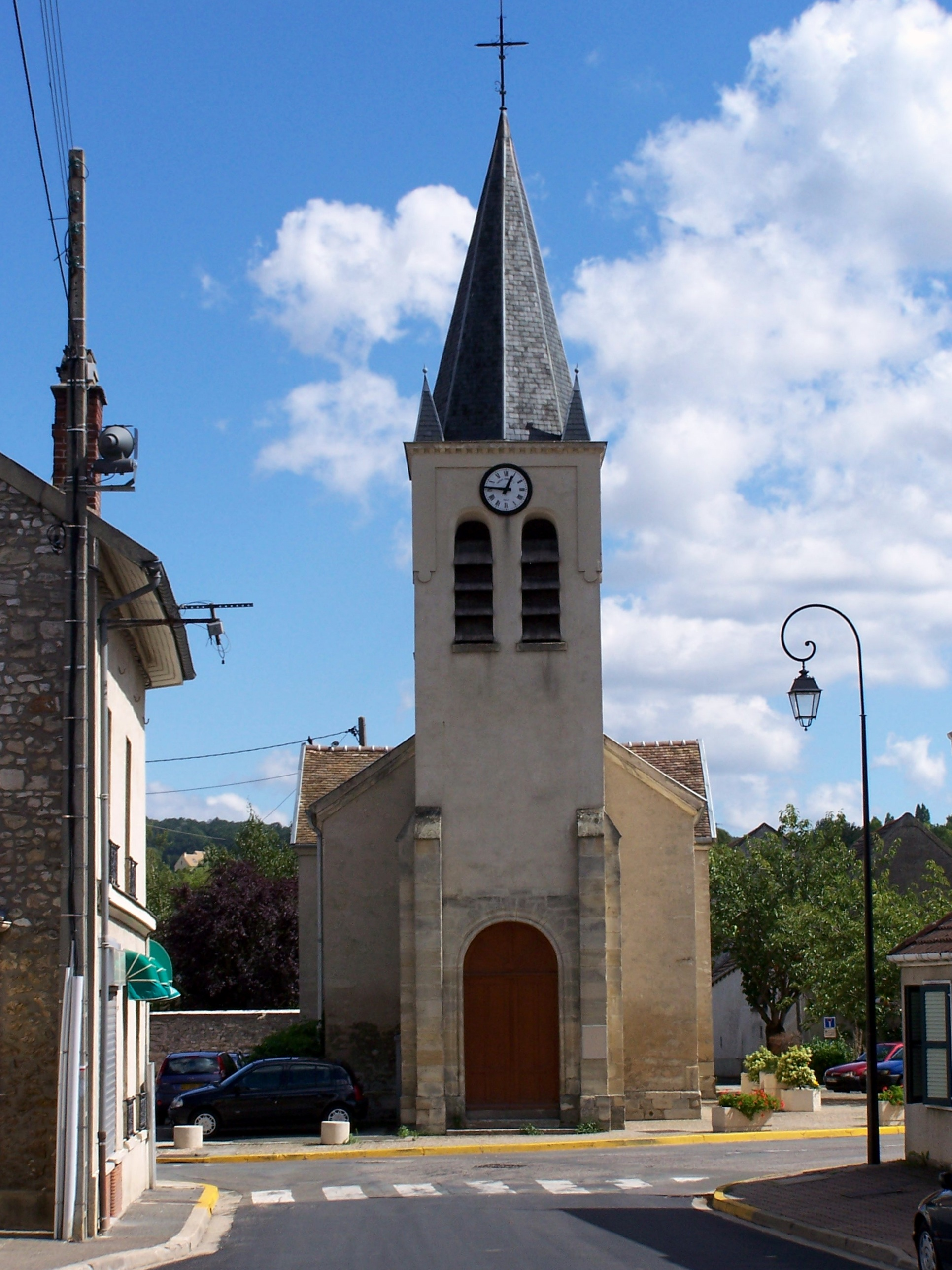 Église d'Aulnay-sur-Mauldre (Yvelines, France)